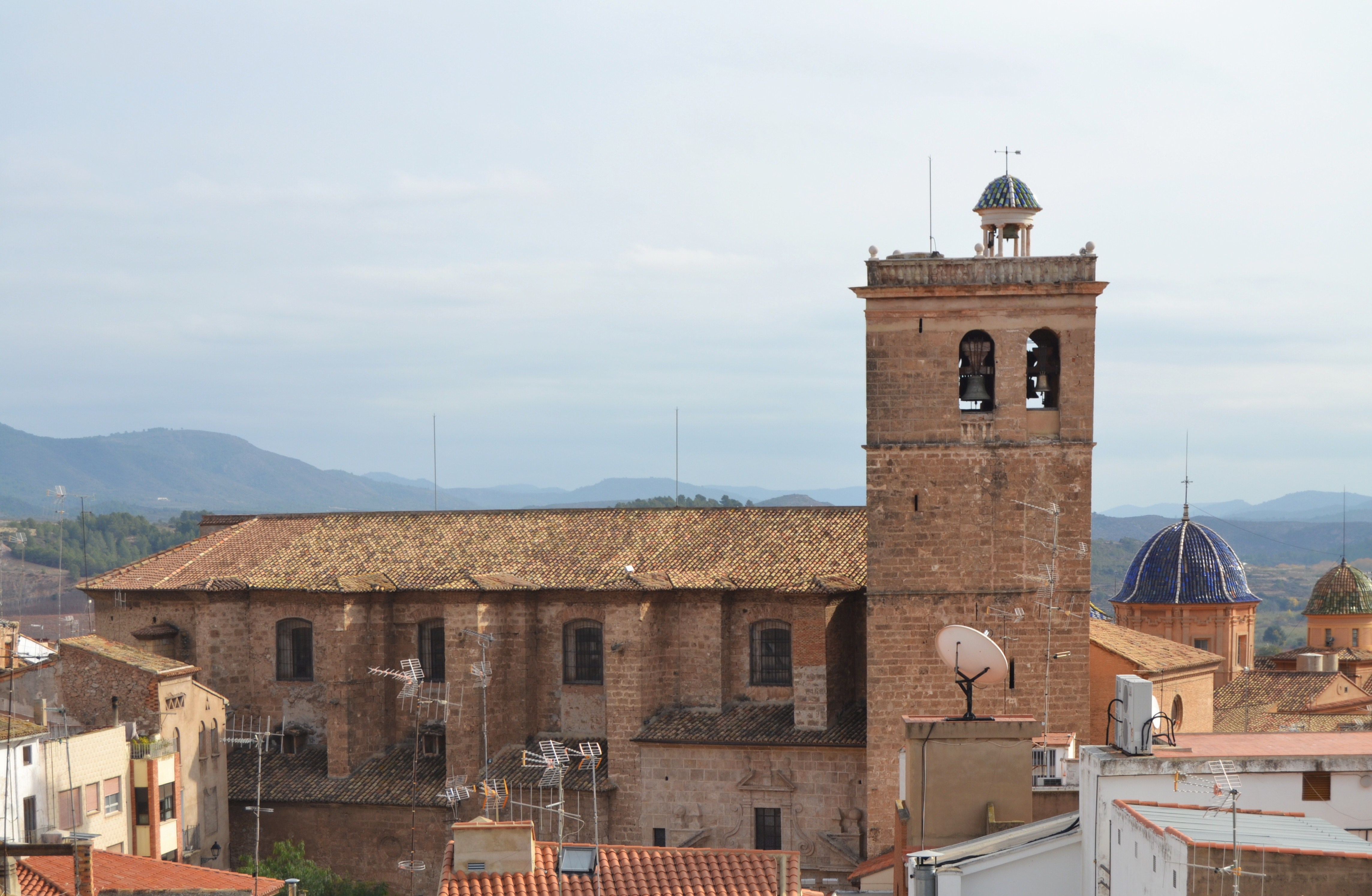 Catedral de Sogorb des de la torre de la Presó.